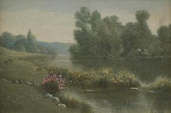 Paesaggio primaverile, olio su tela, 20 x 30 cm., firmato, coll. privata